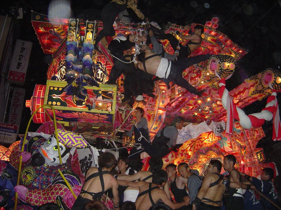 南砺市福野で行われる福野夜高祭の喧嘩「曳き合い」です。